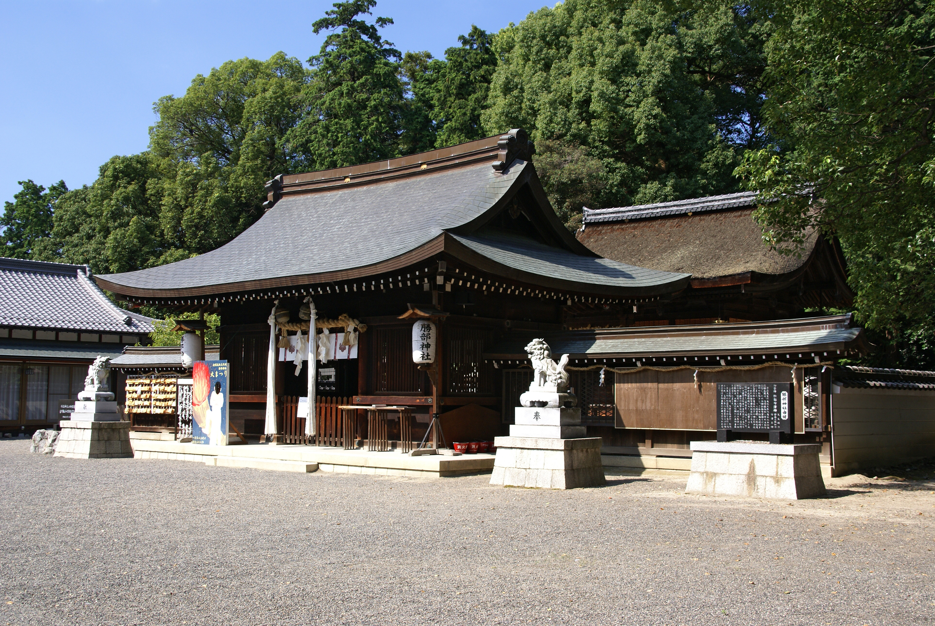 Katsube-jinja in Moriyama, Shiga prefecture, Japan